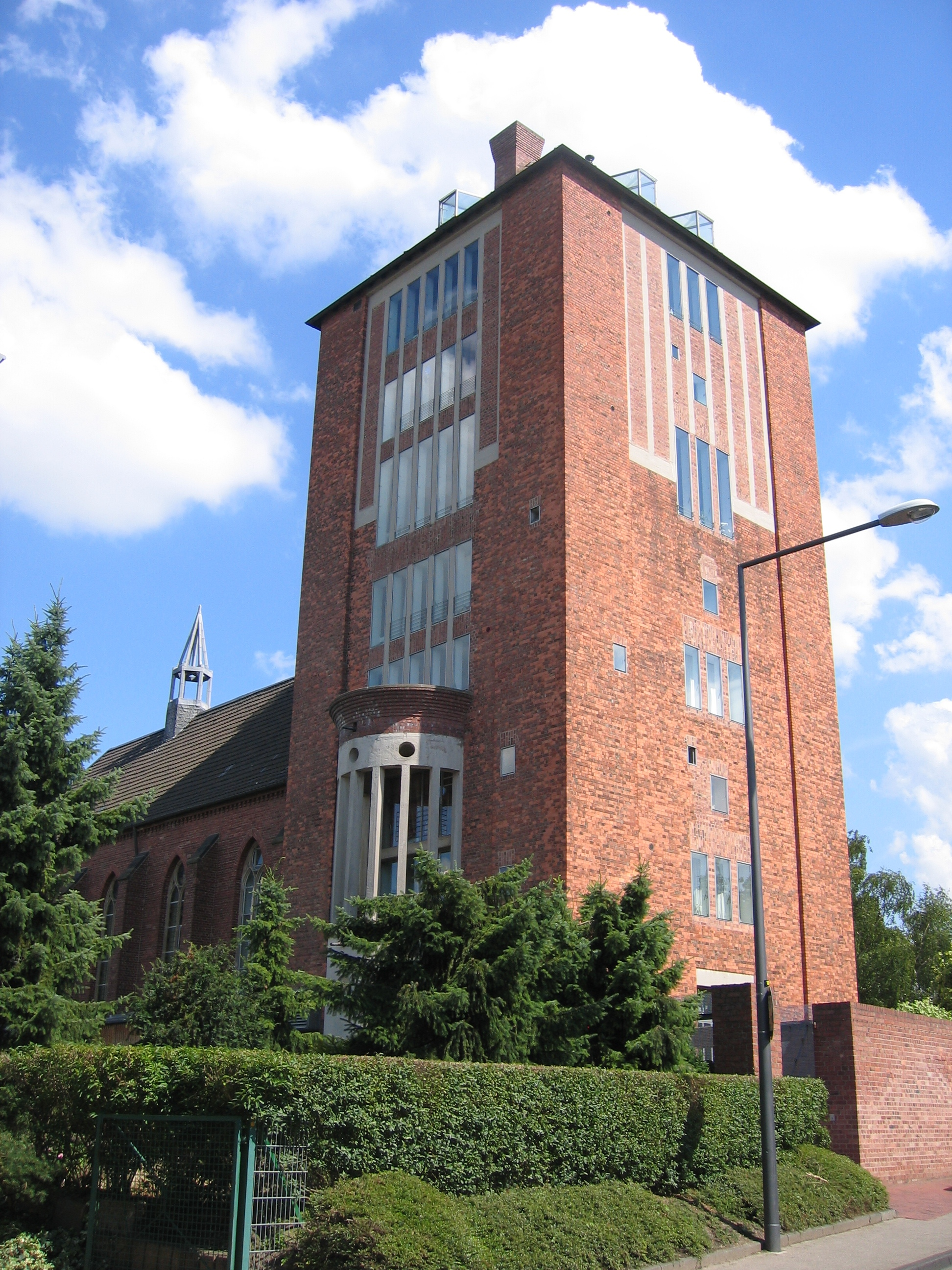 Katholische Kirche Heilige Drei Könige in Köln-Rondorf This is a photograph of an architectural monument.